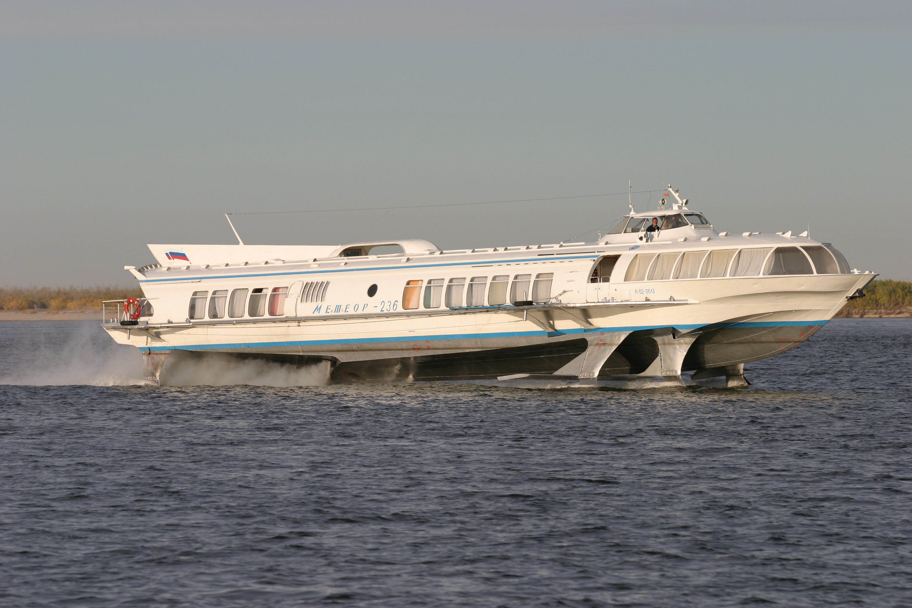 Судно скоростного флота Якутии